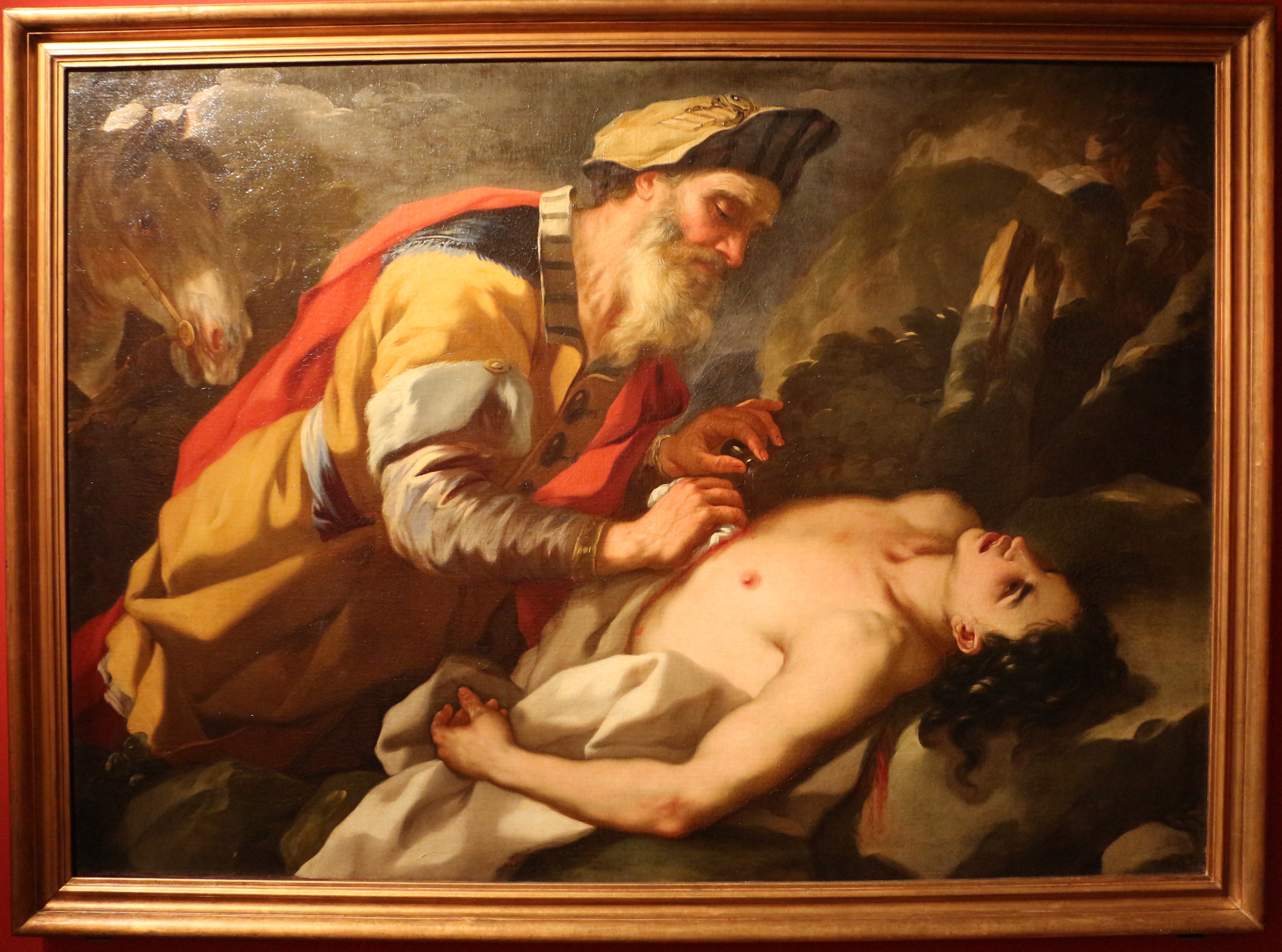 Museo civico (Prato) This is a photo of a monument which is part of cultural heritage of Italy.